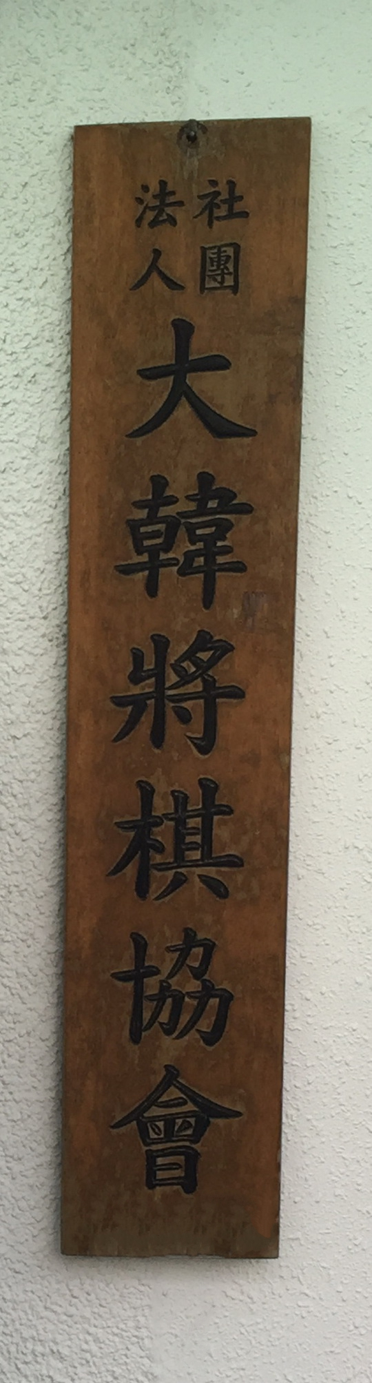 대한장기협회 현판